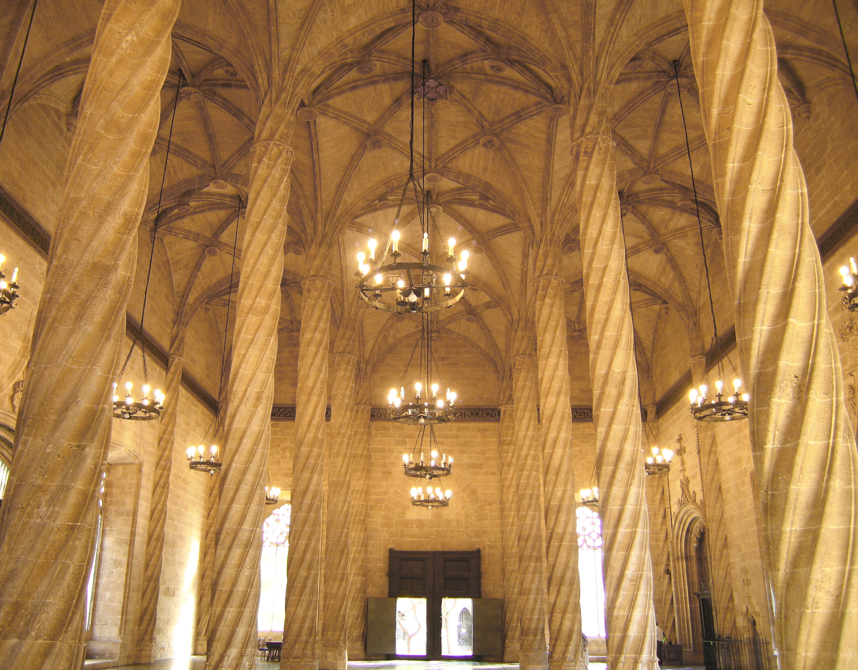 Sala de Contractació de la Llotja de València